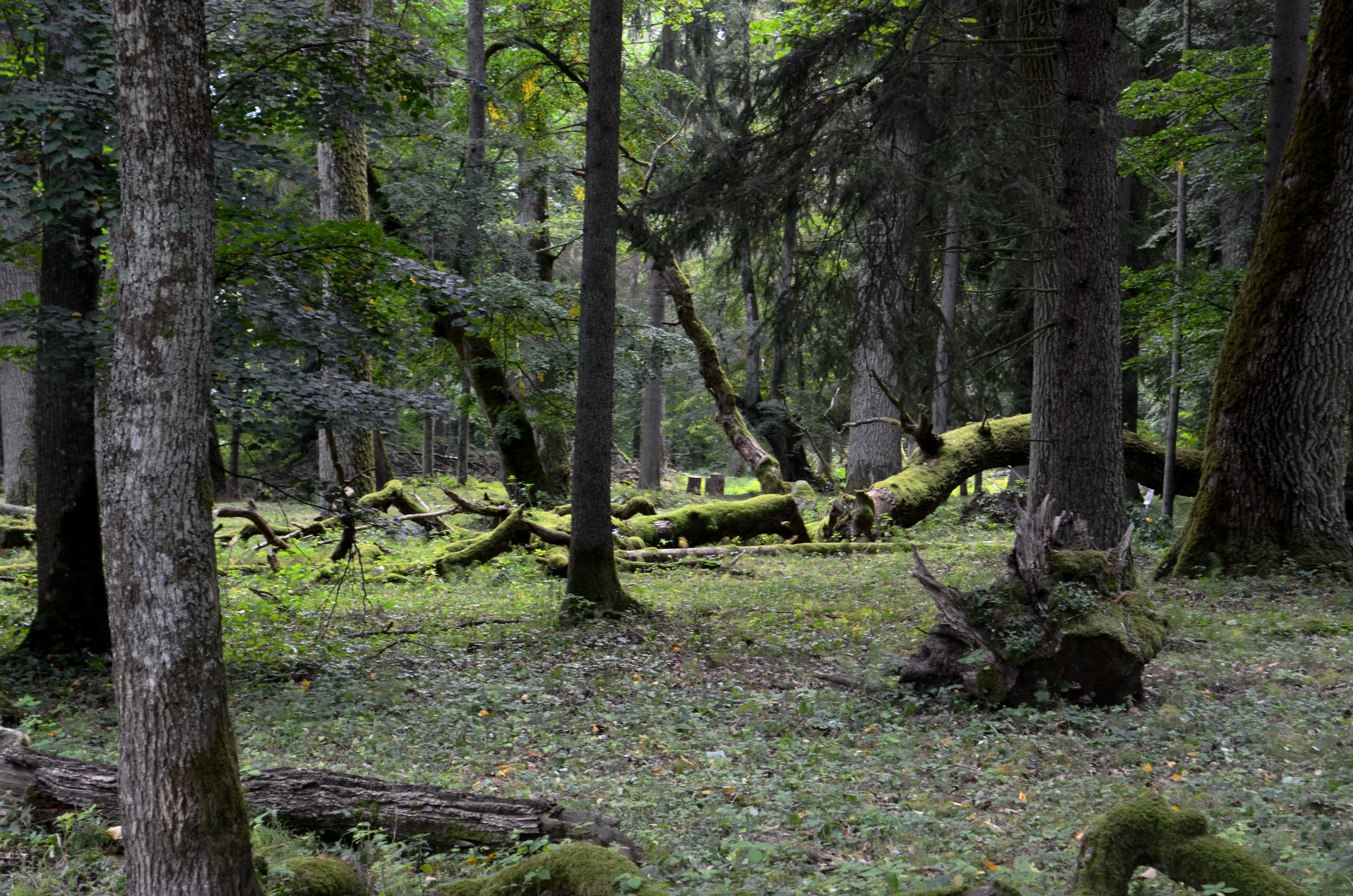 Punios šilas, Alytaus raj.